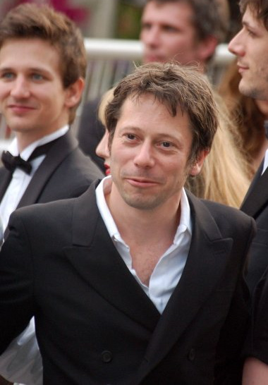 Mathieu Amalric au festival de Cannes